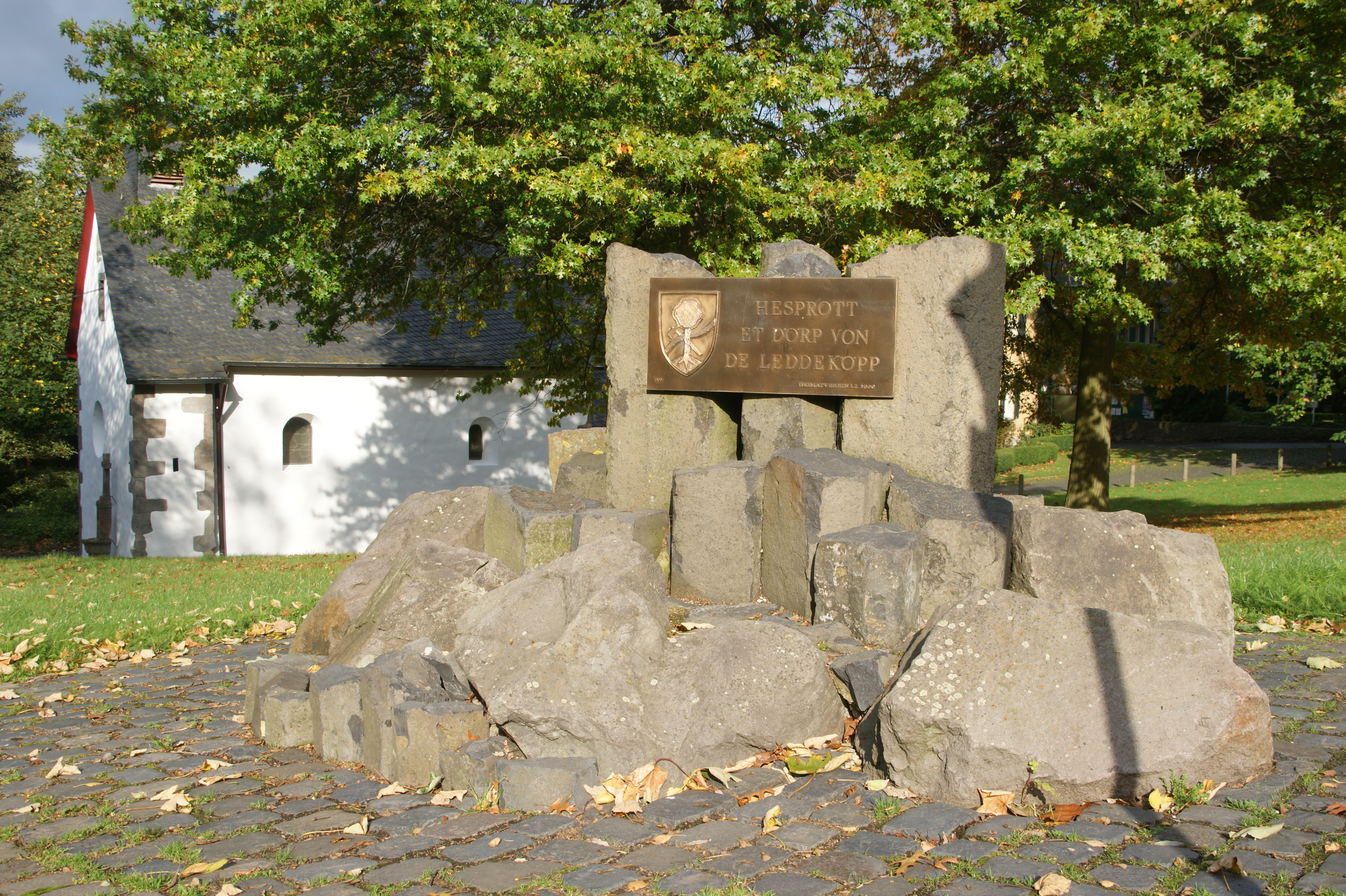 Leddeköpp-Denkmal (2000) mit Bronzetafel von Sigrid Wenzel in Heisterbacherrott mit Nikolauskapelle im Hintergrund, Königswinter